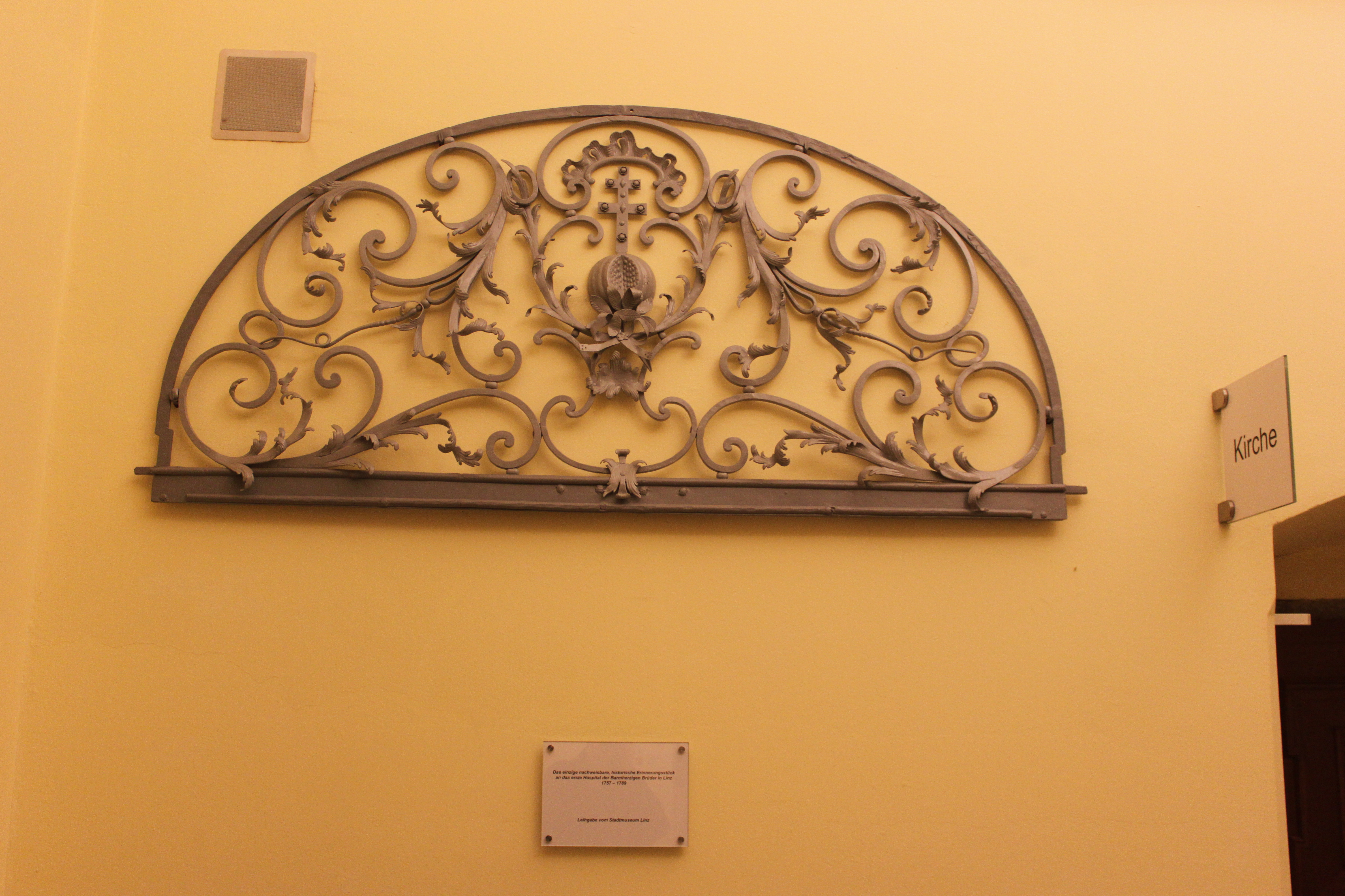 Kirche und Konvent der Barmherzigen Brüder, im Kreuzgang des Konventes beim Zugang zur Kirche, Schmiedeeisener oberer Rundbogenabschluß, nachweislich ein Rest aus dem Vorgängerhospital 1757-1789 am heutigen Schillerplatz, Leihgabe vom Stadtmuseum Linz